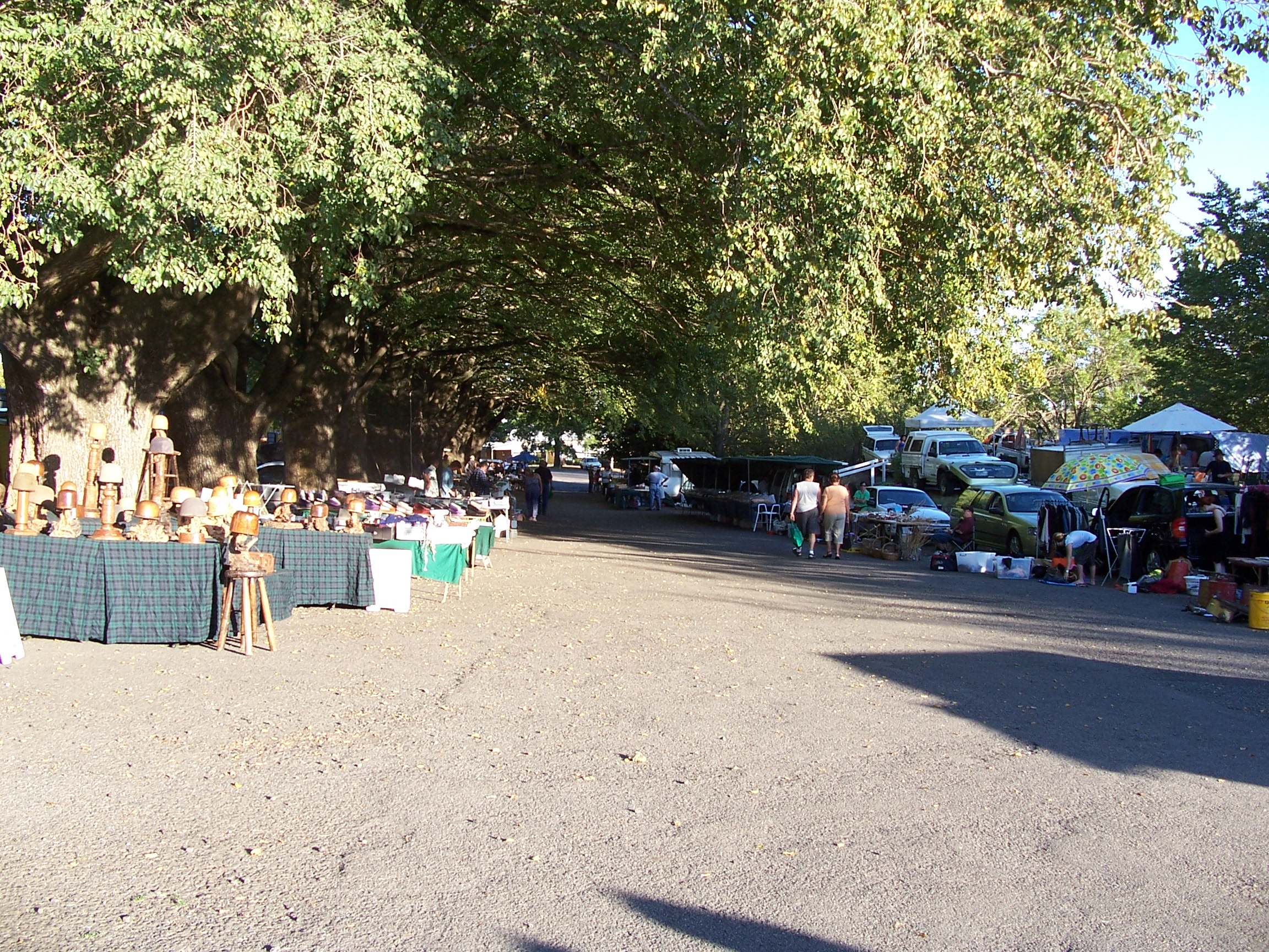 Daylesford Sunday Market